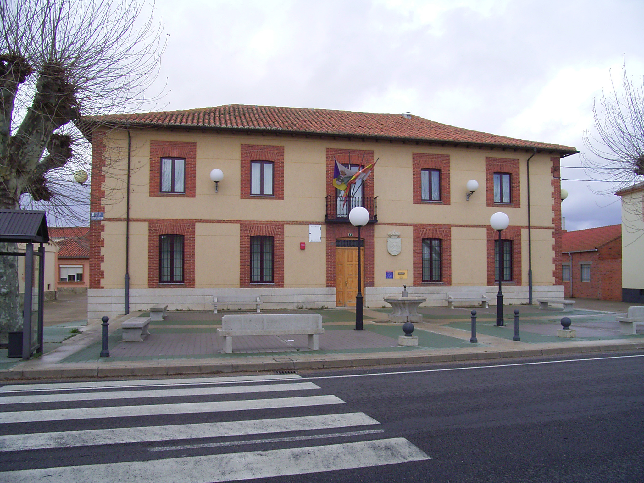 Casa consistorial de Turcia. Construida en el año 1915.